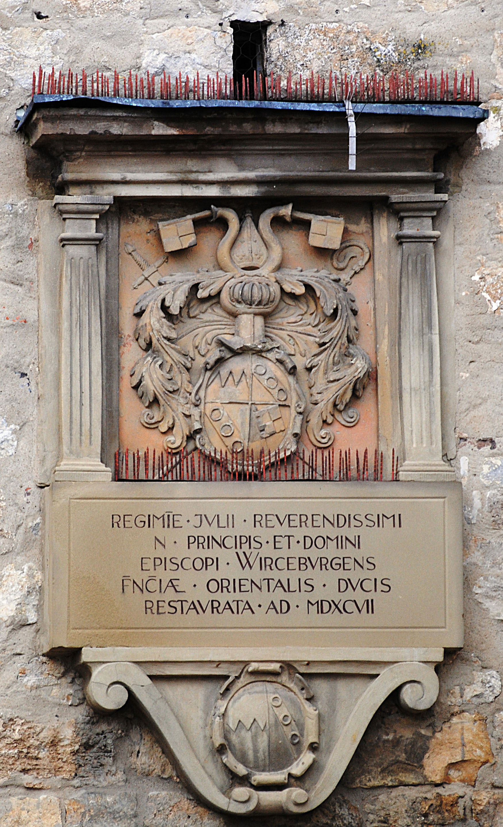 Volkach, Wappen, Sommeracher Tor, Wappen des Fürstbischofs Julius Echter von Mespelbrunn am Sommeracher Tor